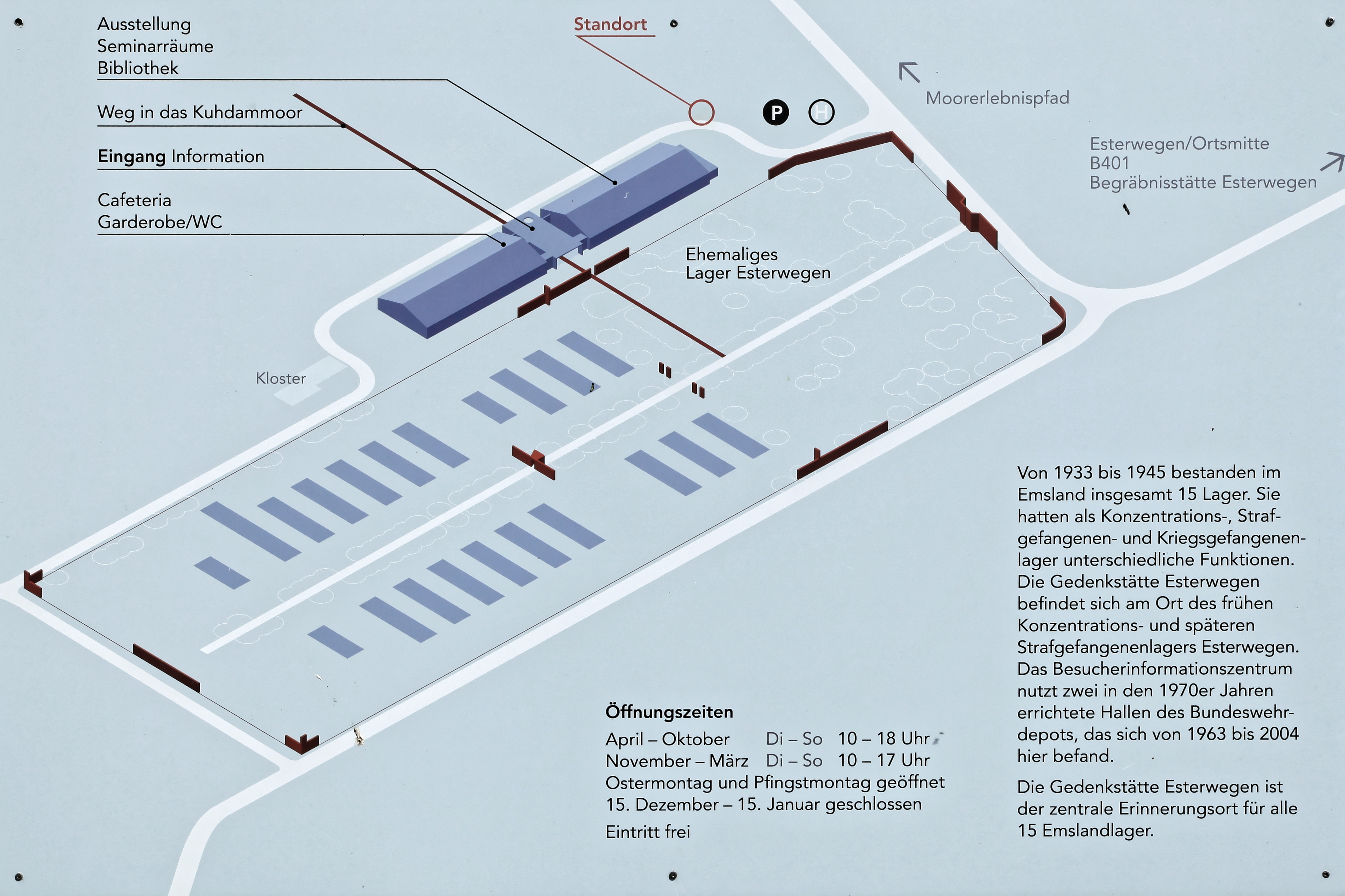 Gedenkstätte Esterwegen, Hinterm Busch in Esterwegen